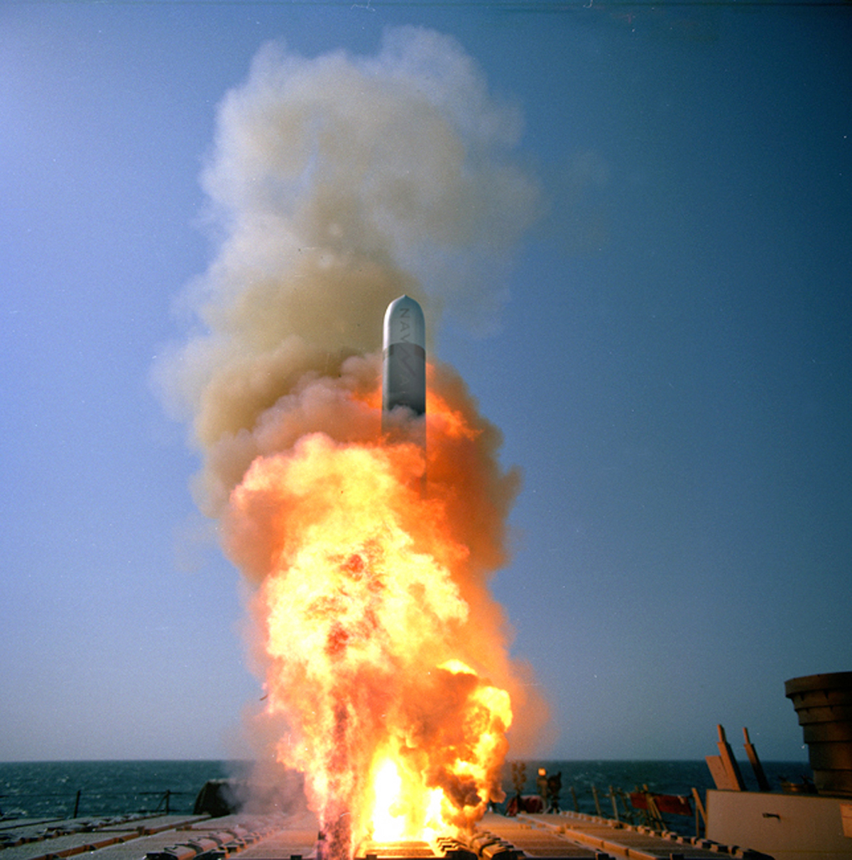 Lanzamiento de un misil de crucero Tomahawk Táctico desde el USS Stethem. Caption: 030508-N-0000X-001 At sea aboard USS Stethem (DDG 63) – A Tactical Tomahawk Cruise Missile launches from the guided missile destroyer USS Stethem (DDG 63) during a live-warhead test. The missile traveled 760 nautical miles to successfully impact its intended target on San Clemente Island, part of the Naval Air Systems Command (NAVAIR) test range in Southern California. The Tactical Tomahawk is the next generation of Tomahawk cruise missile, and adds the capability to reprogram the missile while in-flight to strike any of 15 preprogrammed alternate targets, or redirect the missile to any Global Positioning System (GPS) target coordinates. It also will be able to loiter over a target area for some hours, and with its on-board TV camera, will allow the war fighting commanders to assess battle damage of the target, and, if necessary redirect the missile to any other target. Launched from the Navy's forward-deployed ships and submarines, Tactical Tomahawk will provide a greater flexibility to the on-scene commander. Tactical Tomahawk is scheduled to join the fleet in 2004. U.S. Navy photo. (RELEASED)